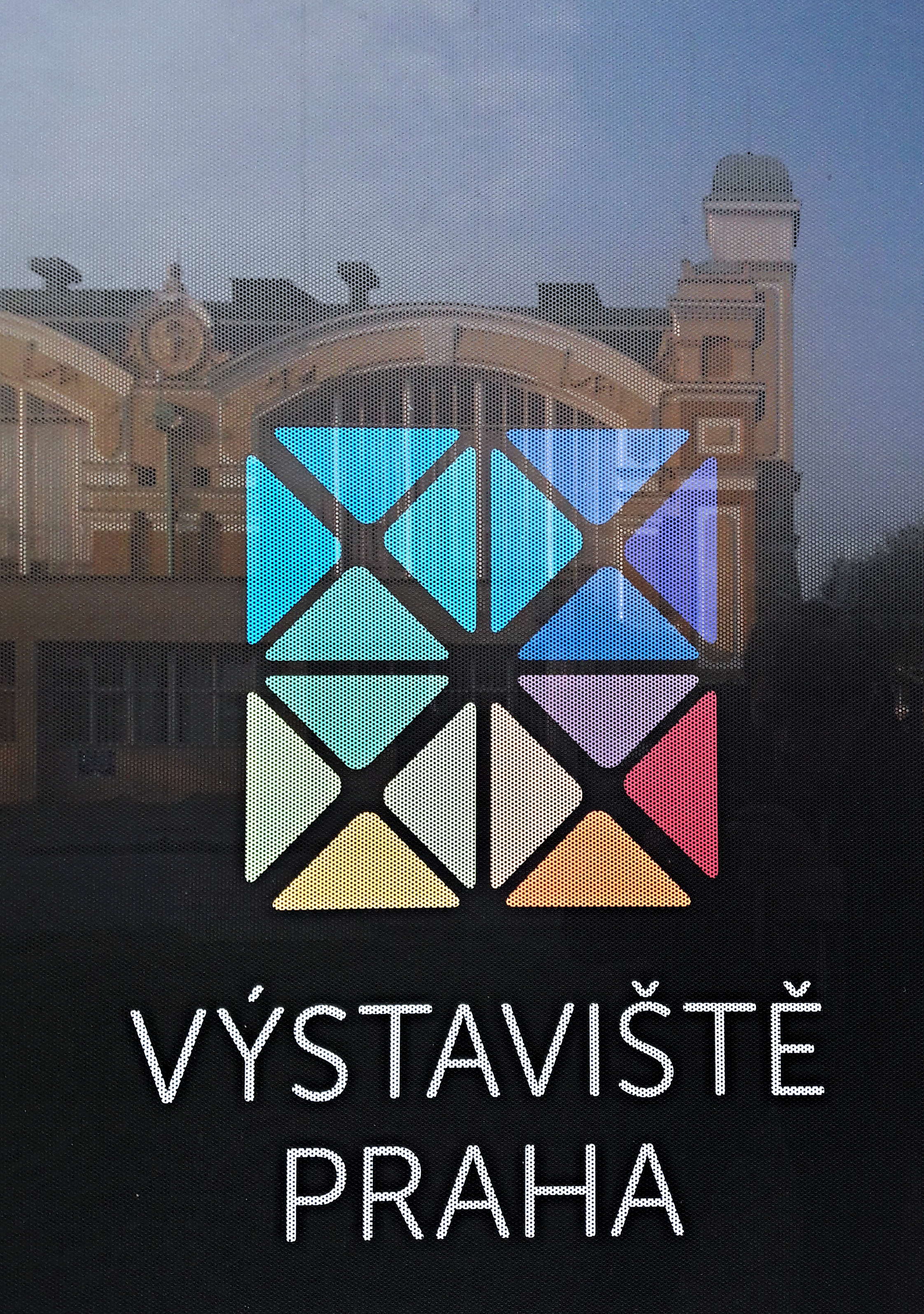 Výstaviště, Praha